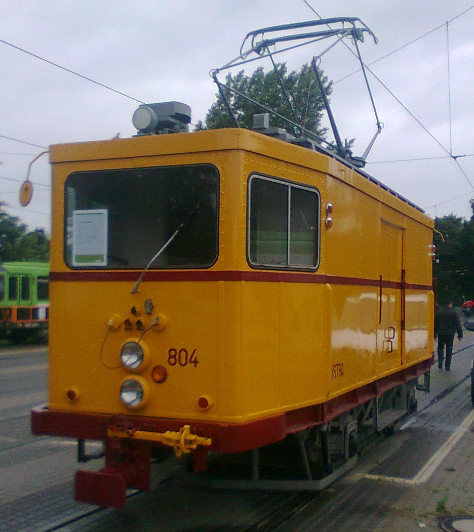 Historischer Arbeitstriebwagen 804 der Üstra auf dem Betriebshof Glocksee (TdoT)